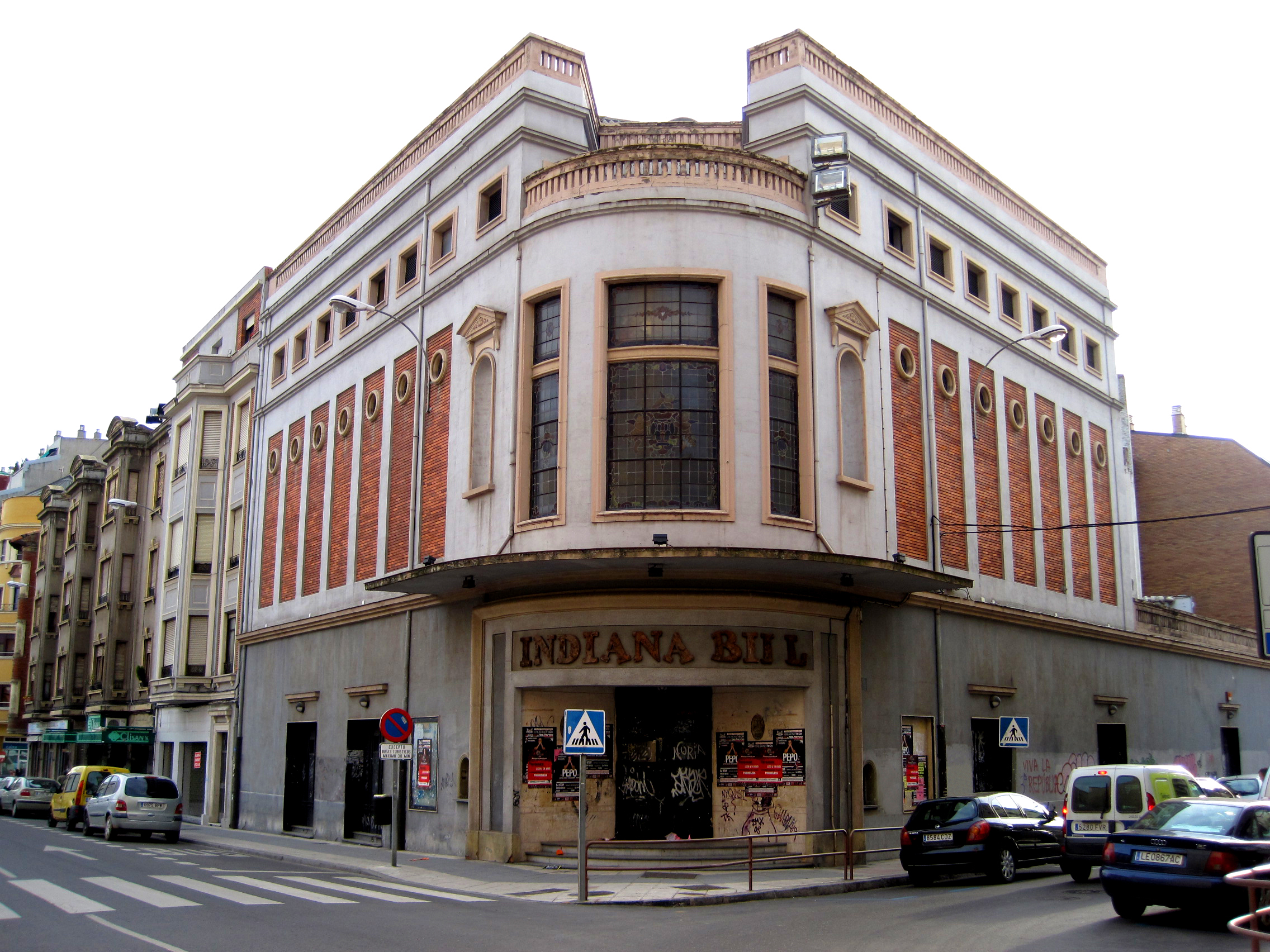 Vista del teatro Trianon, en León (España).